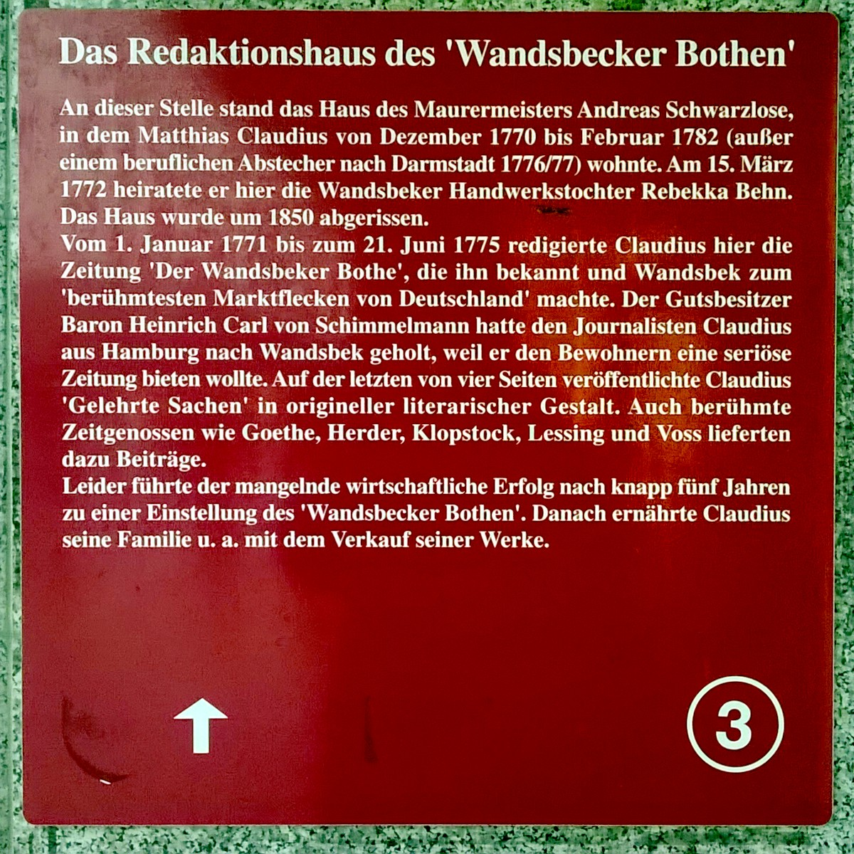 Wandsbeker Historische Tafel: Redaktionsaus des "Wandsbecker Bothen", Standort Wandsbeker Marktplatz